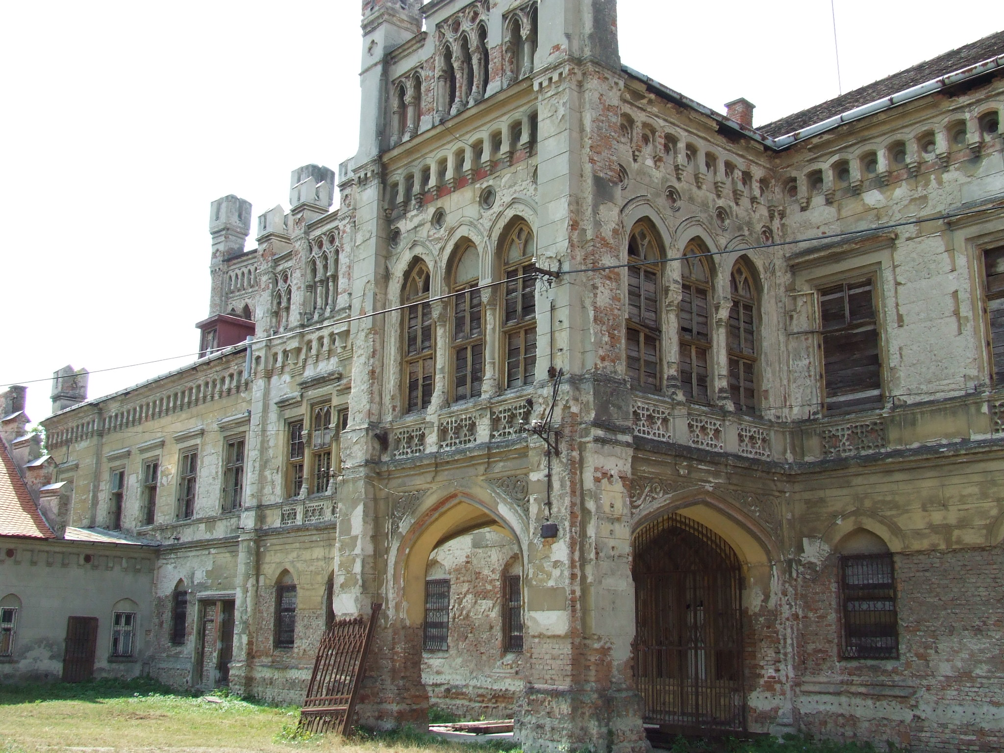 Neogótikus kastély, Galánta